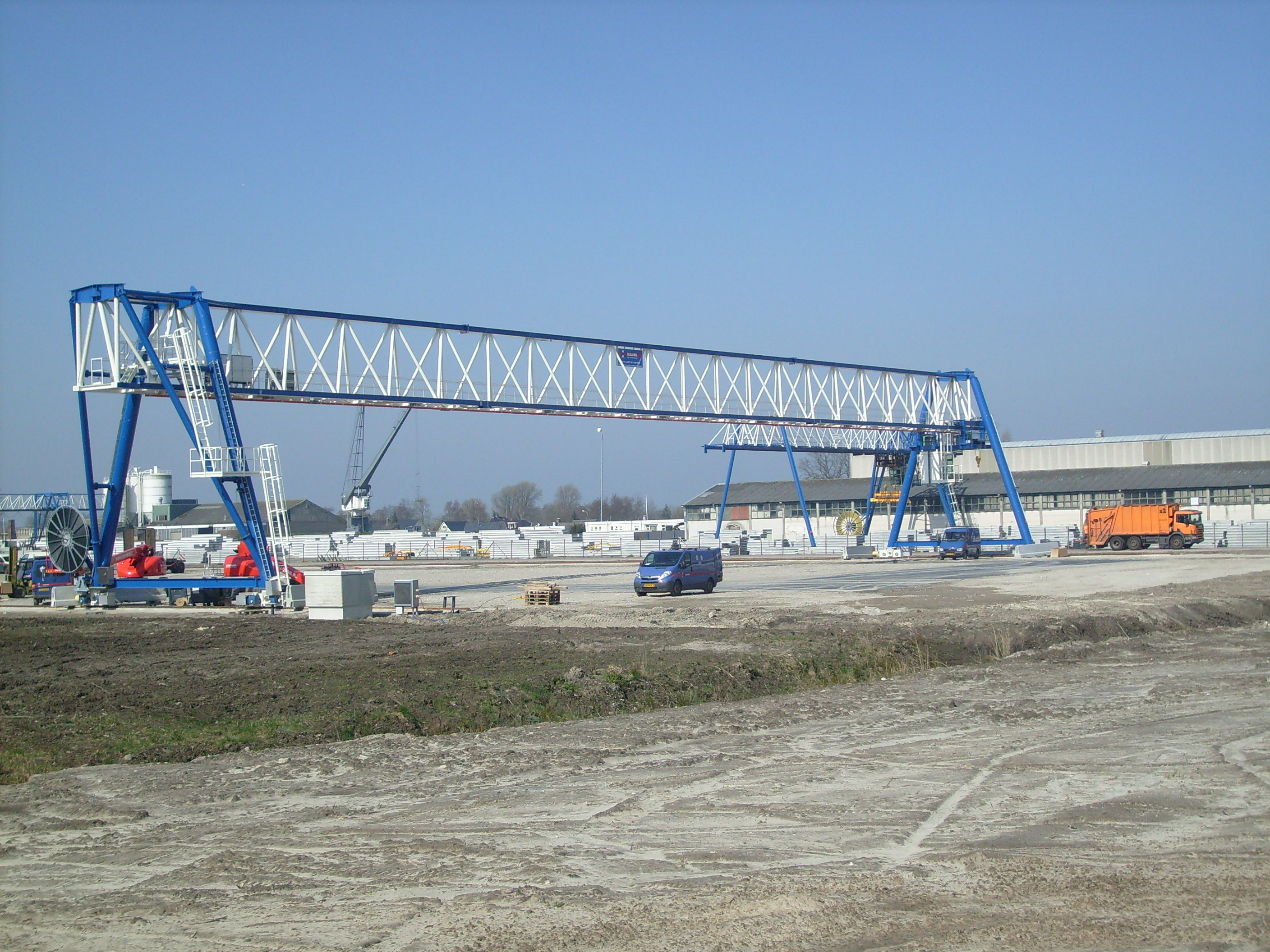 Portaalkraan tbv kanaalplaatvloeren fabrikant